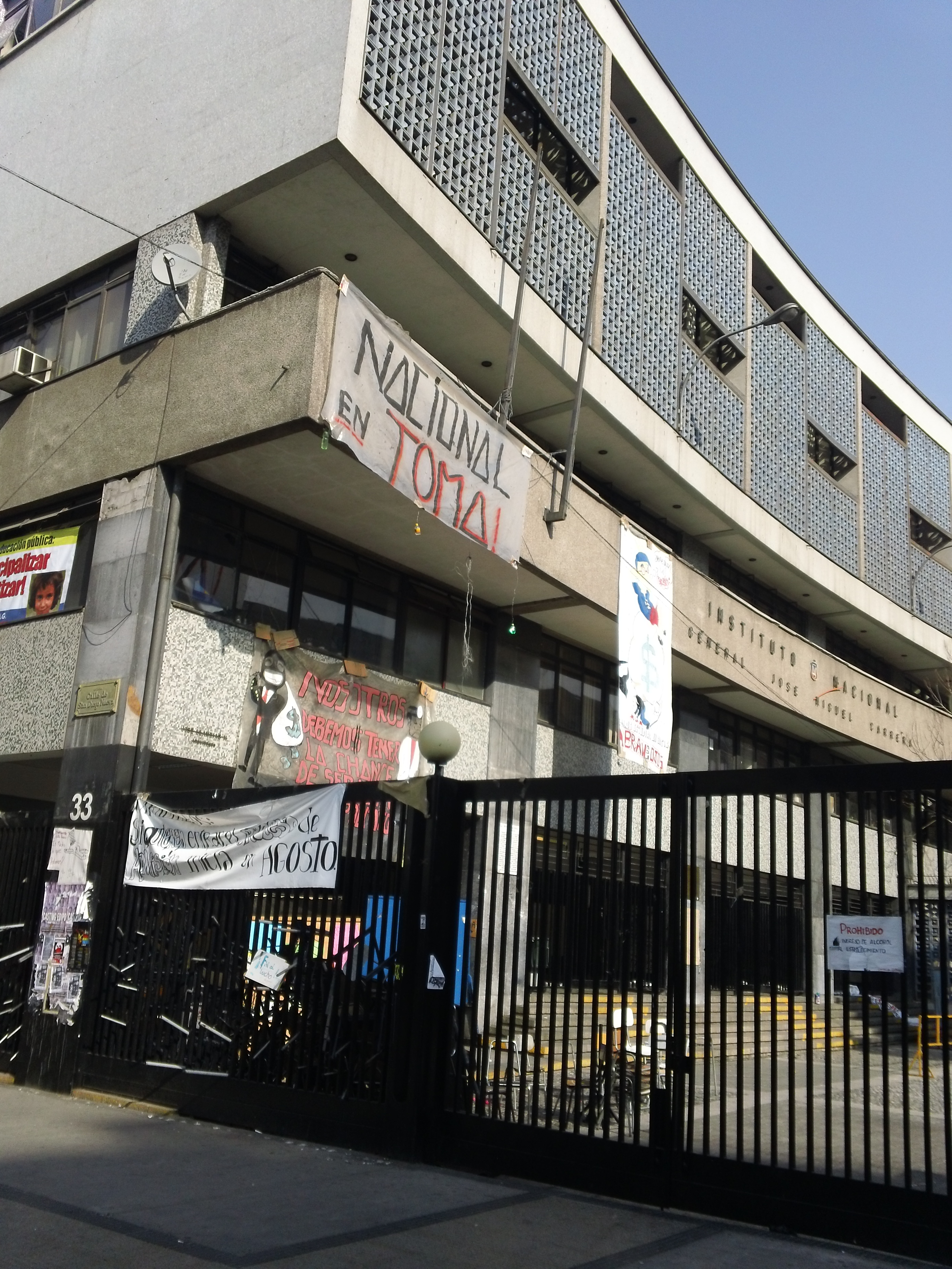 Fotografía del Instituto Nacional, en toma a raíz de la Movilización estudiantil en Chile de 2011.